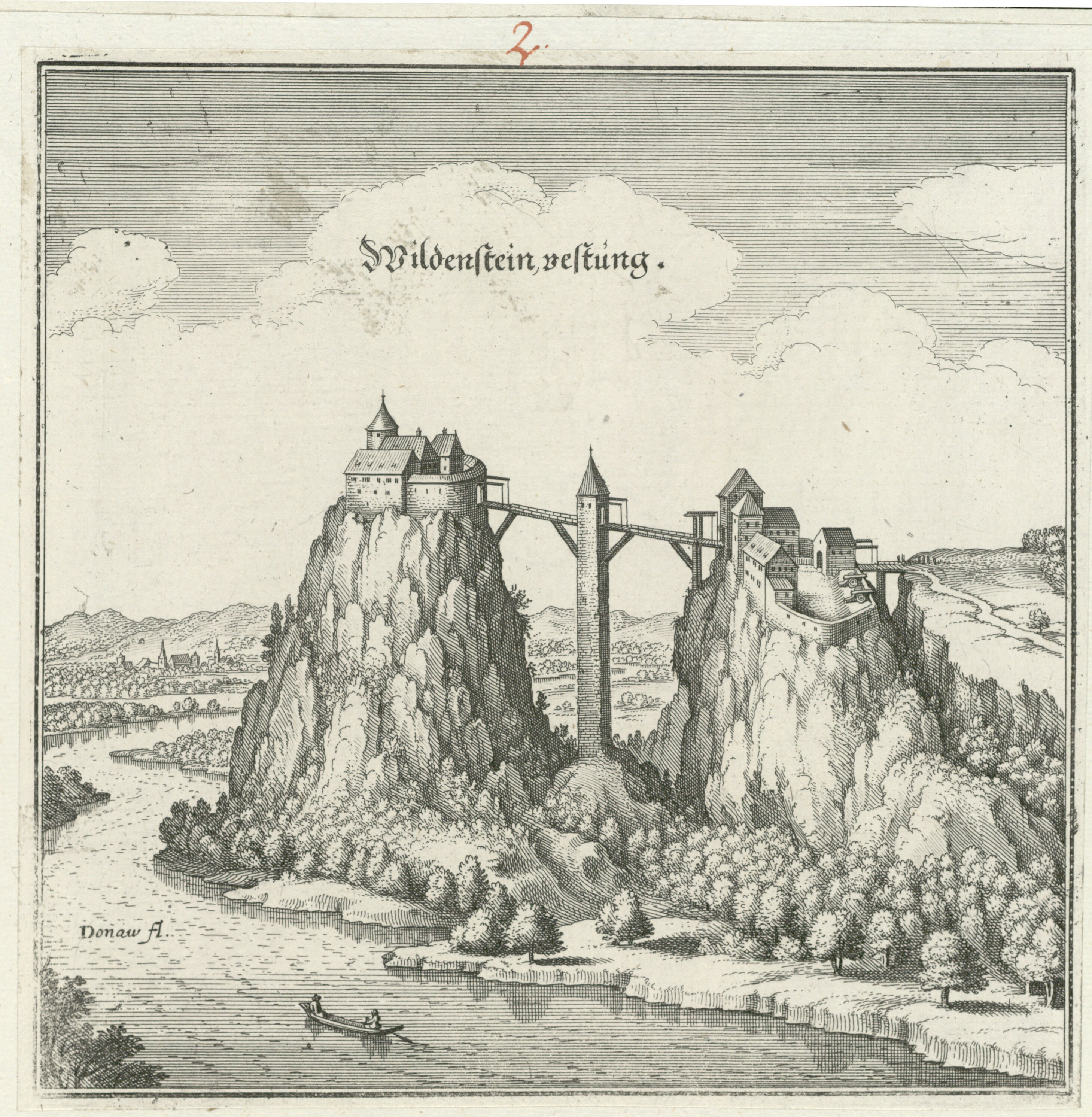 Burg Wildenstein, Kupferstich von Matthäus Merian aus Topographia Sueaviae, Frankfurt am Main 1643